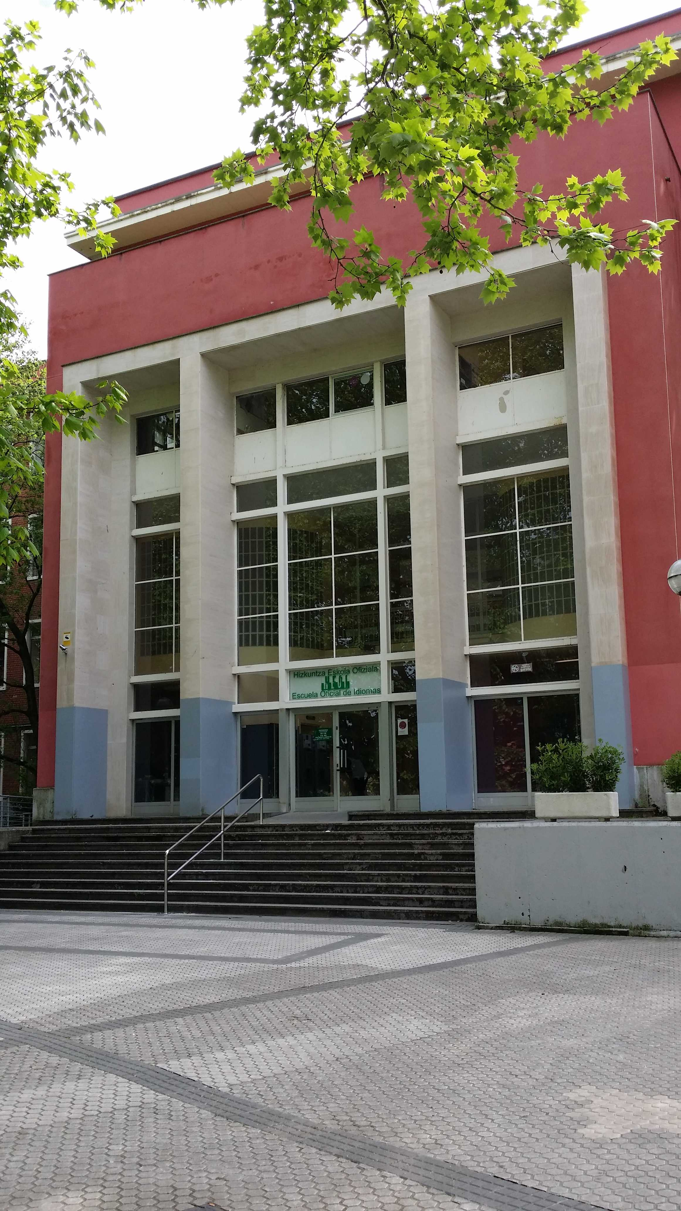 Donostiako Hizkuntza Eskola Ofiziala